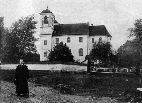 Беларуская (тарашкевіца): Ішчална (Iščałna), Касьцёл Найсьвяцейшай Тройцы